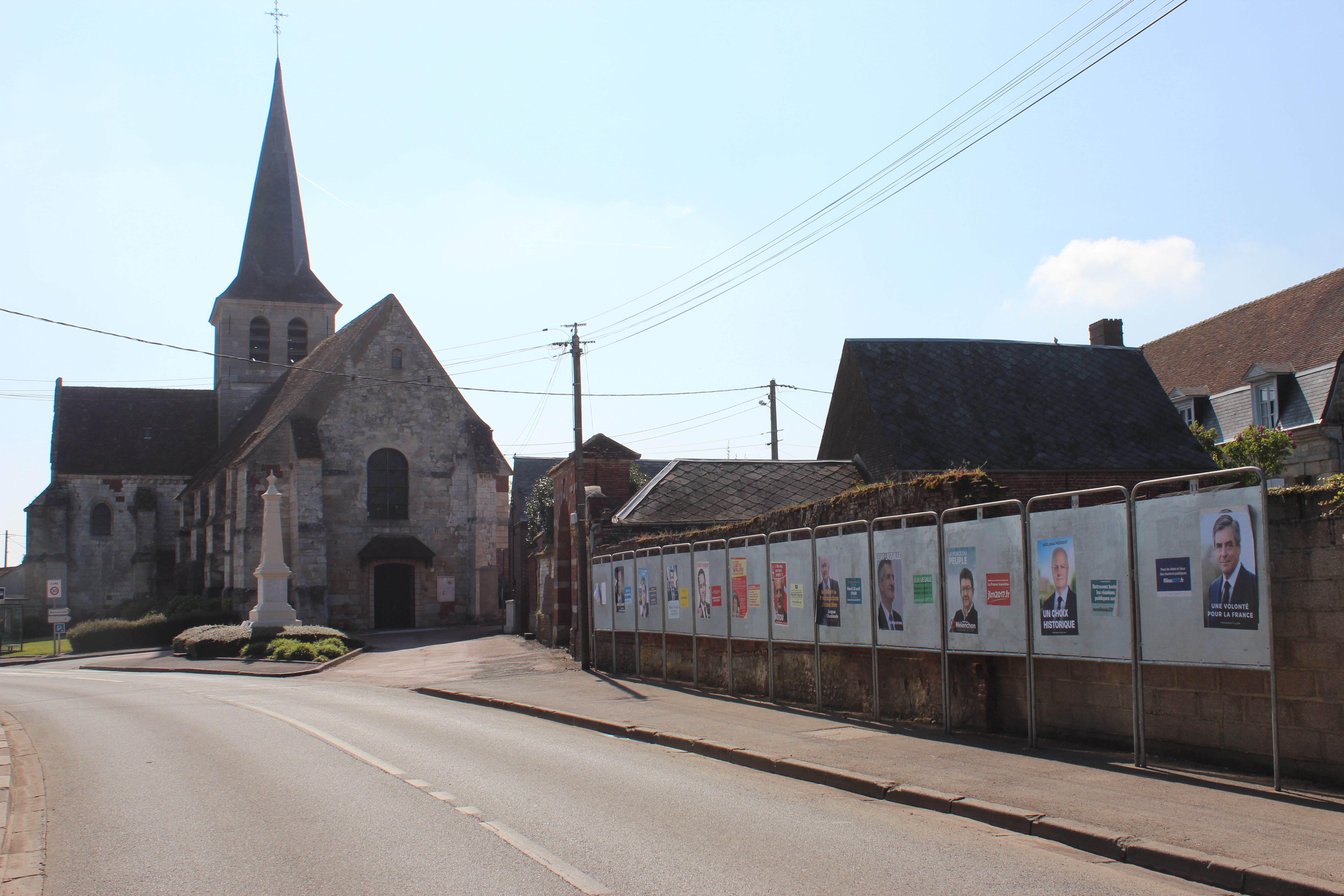 Panneaux électoraux pour le premier tour des élections présidentielles de 2017.